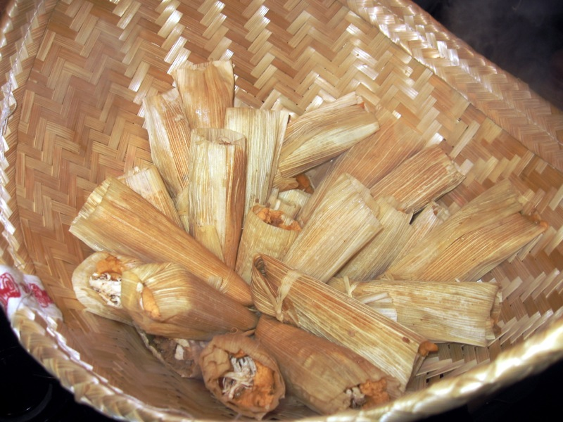 Tamales en una bolsa.